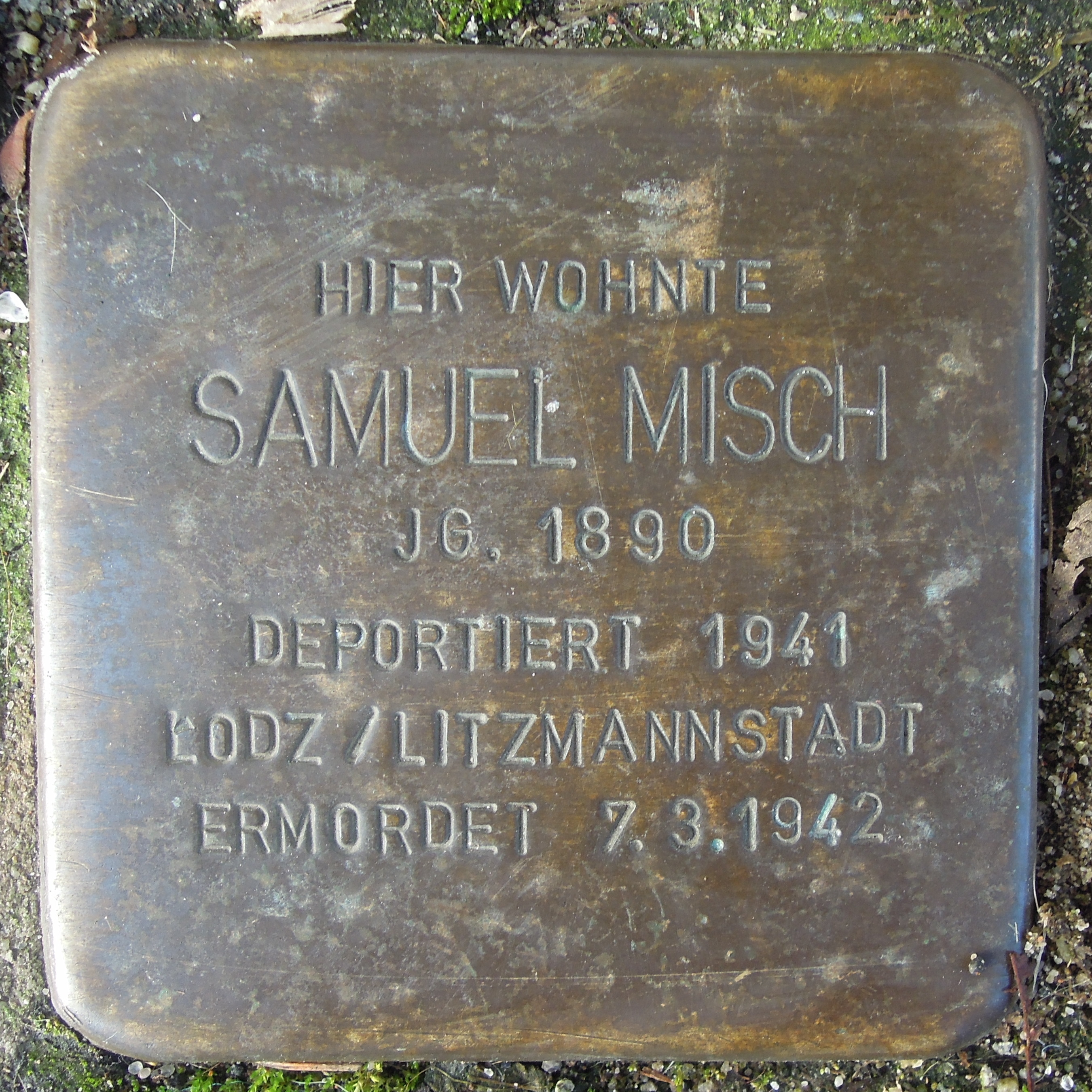 Stolperstein Alpen Burgstraße 17 Samuel Misch